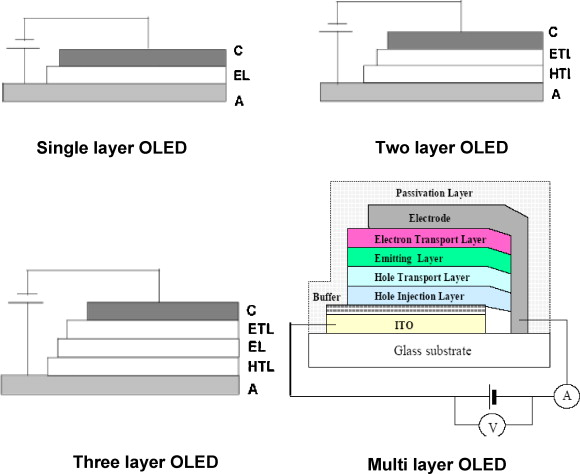 OLED komponent